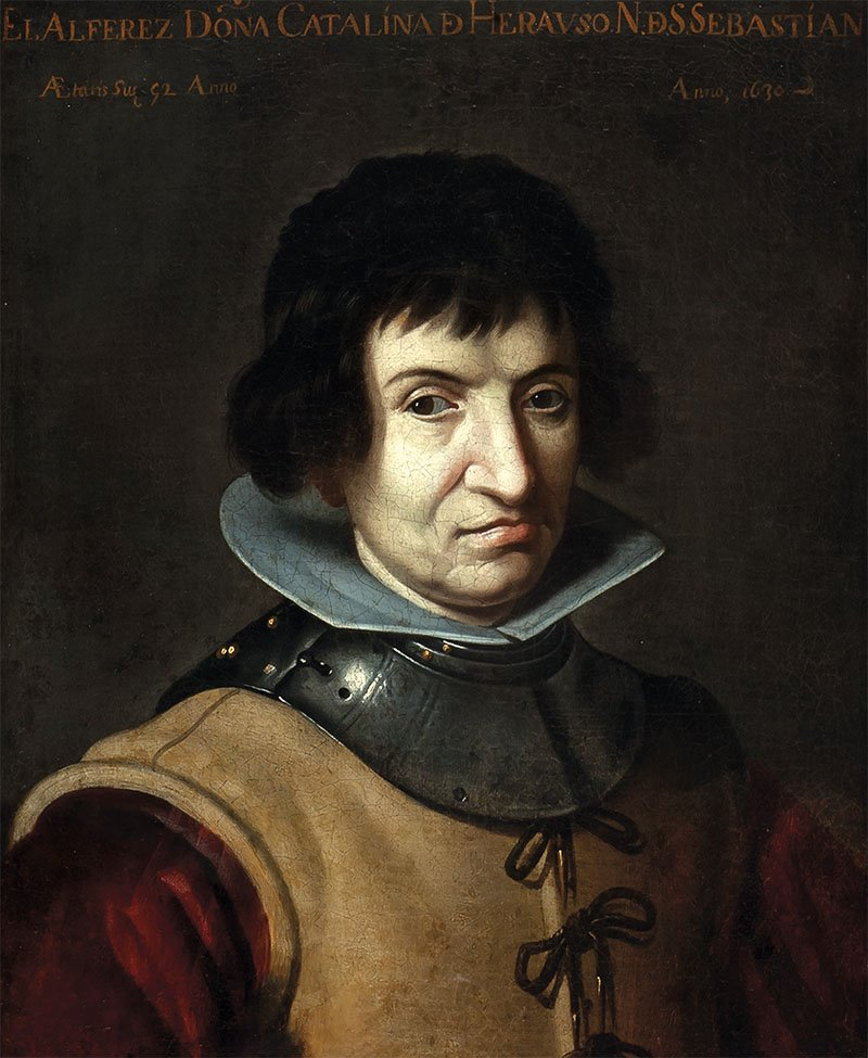 Catalina de Erauso (San Sebastián, España, 1592 - Cuitlaxtla, México, 1650), llamada "La Monja Alférez", fue una monja y soldado española.